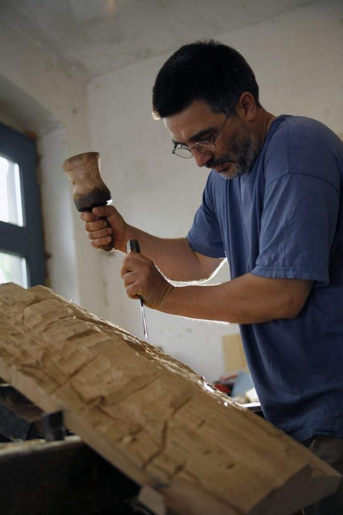 Hans-Georg Wagner bei der Arbeit an einem Holzrelief